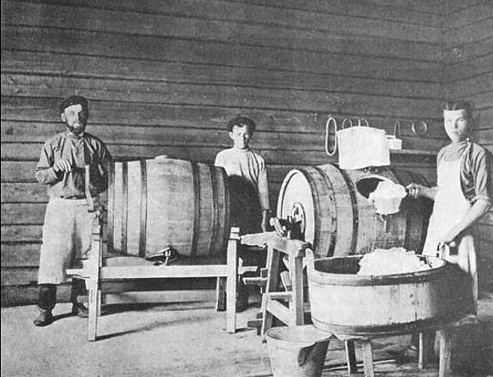 Маслобойня (начало XX в.)